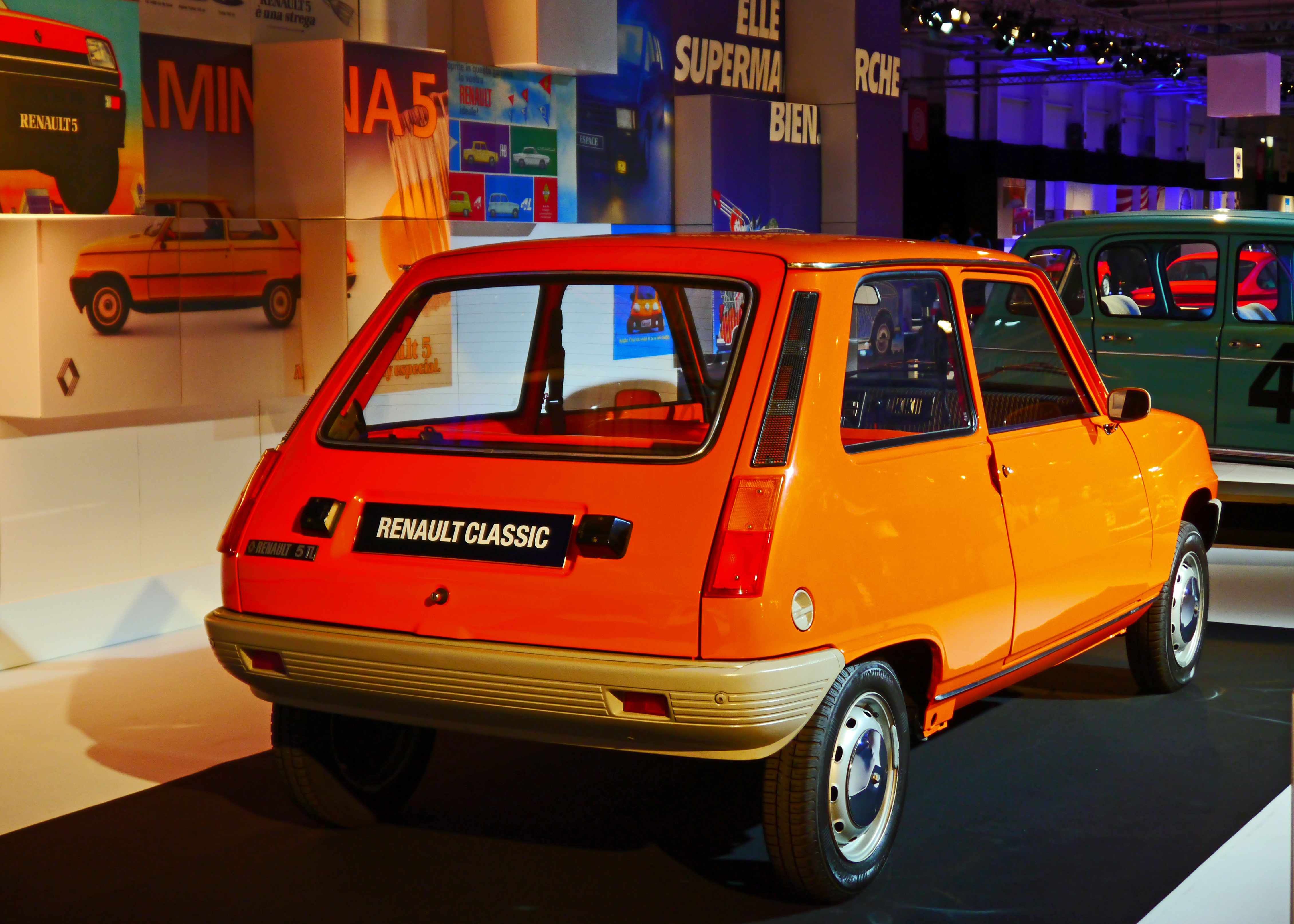 1973 Renault 5 TL. 4-cylinder 956 cc engine (34 bhp).